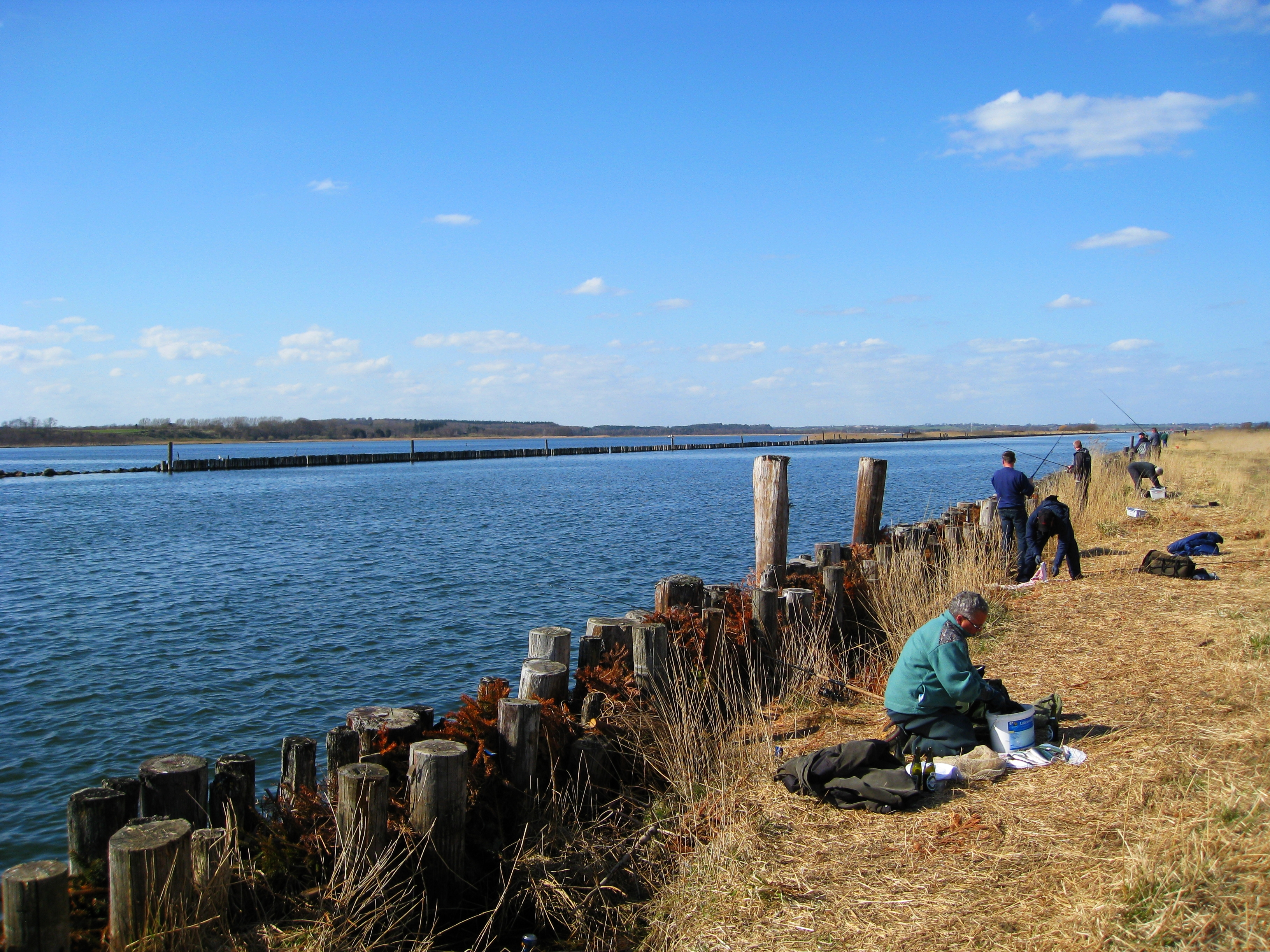 Randers Fjord, lystfiskere v. Voer